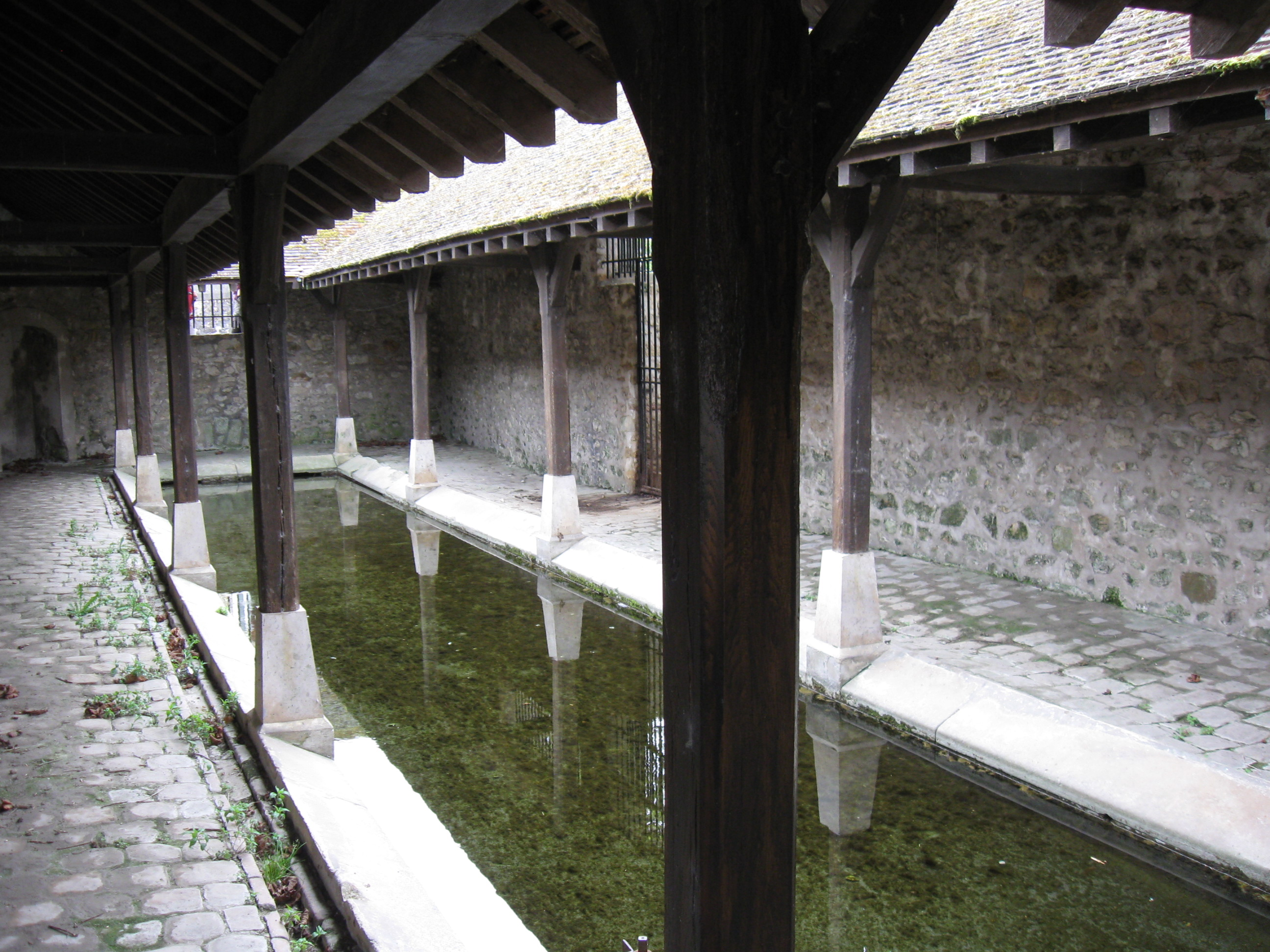 Lavoir communal de Maincy. ( Seine-et-Marne, région Île-de-France).